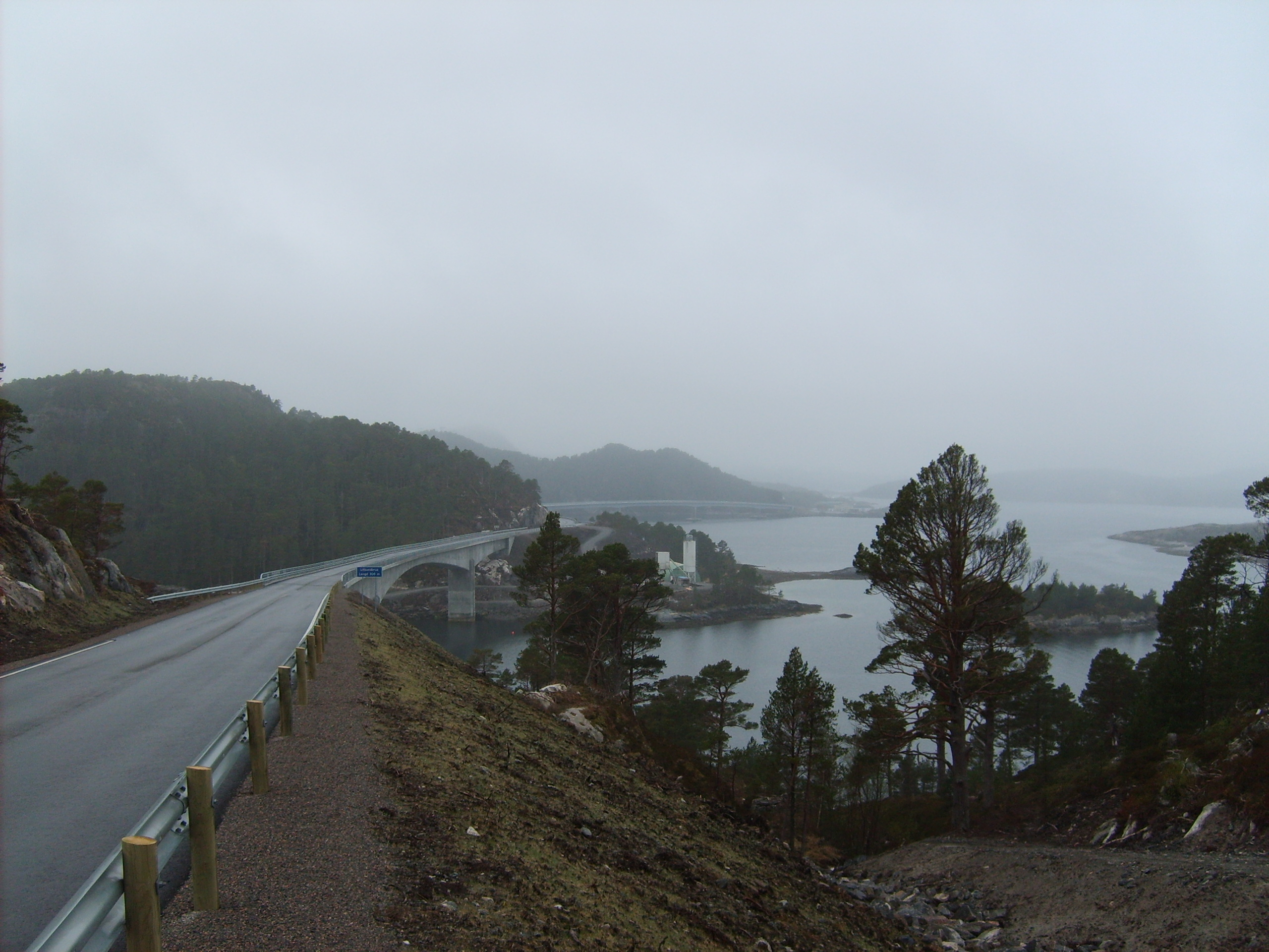 Norsk (nynorsk): Imarsundprosjektet: Litlsundbrua, vegen over Jørnøya og Imarsundbrua sett frå Ertvågsøya. (Foto: Olve Utne)